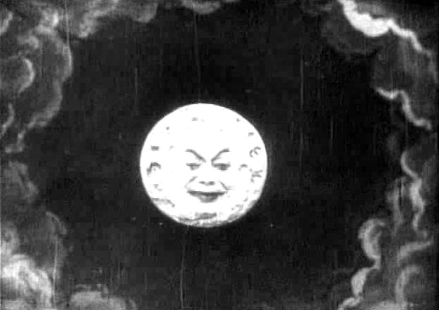 Méliès, viaggio nella luna (1902) 06